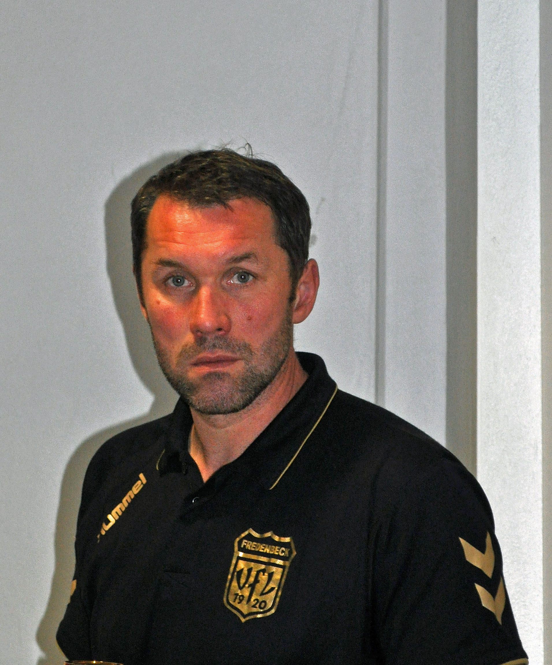 Tomasz Malmon, Trainer des VfL Fredenbeck, nach dem Punktspiel in der 3. Liga zwischen dem Stralsunder HV und dem VfL Fredenbeck beim Pressegespräch.